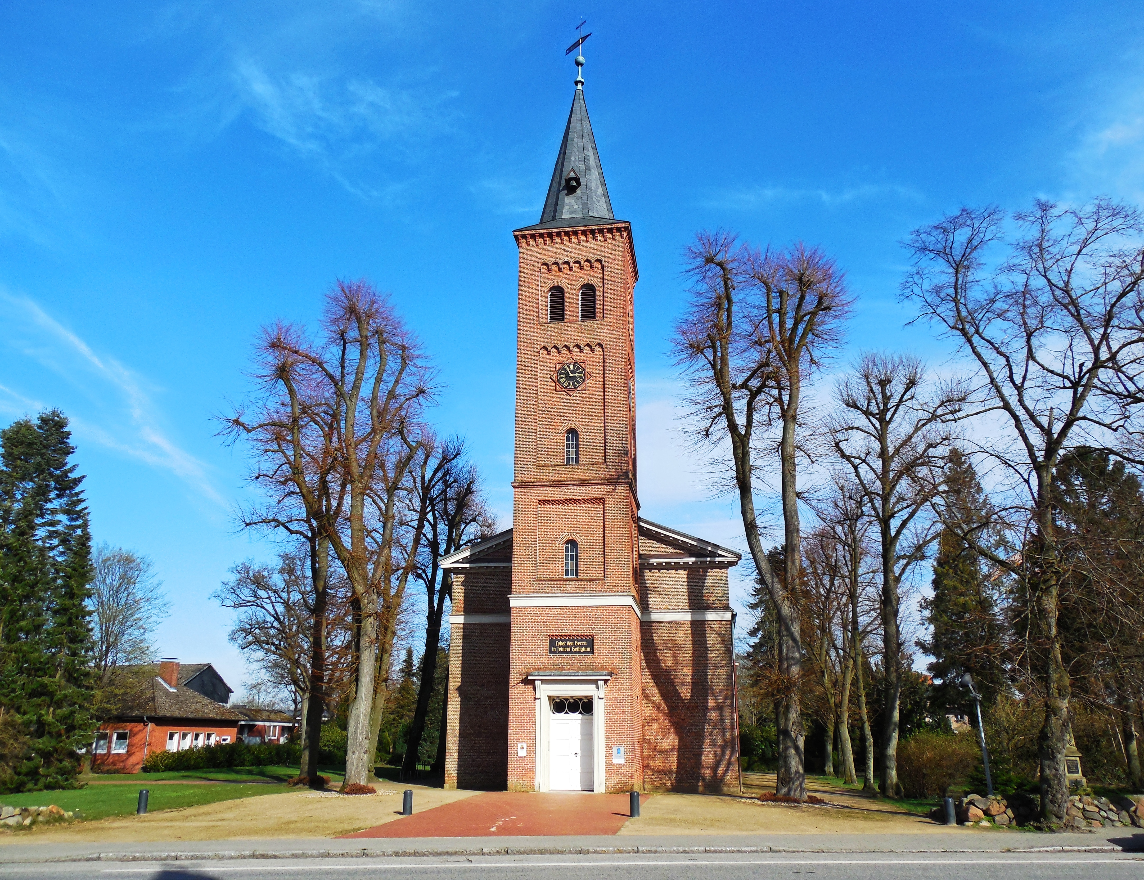 Ev.-Luth. Marienkirche Quickborn